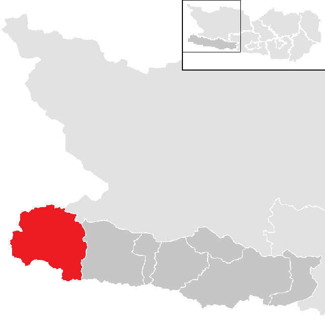 Bezirk Hermagor